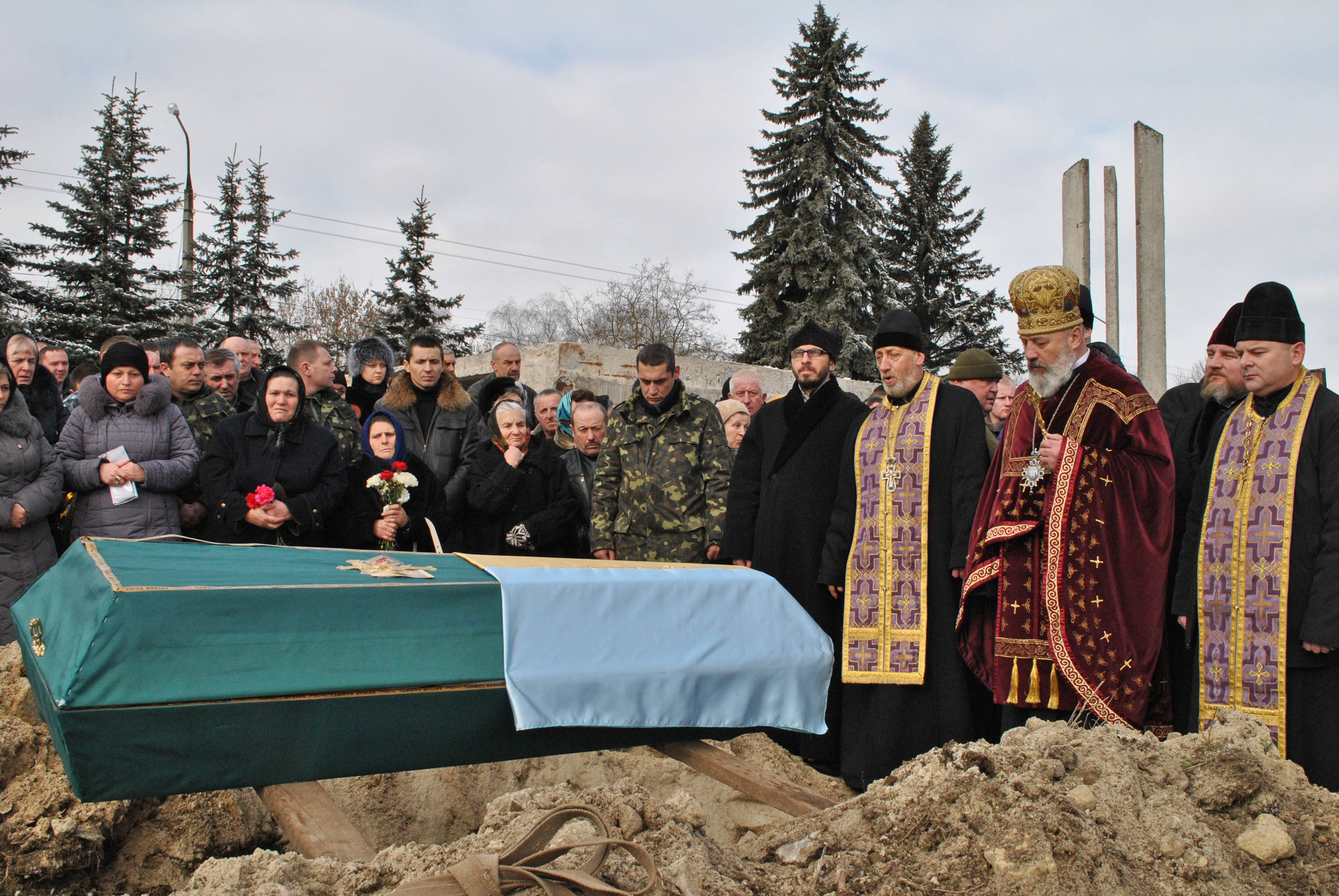 Похорон військовослужбовця 6-го БТО Тернопільської області «Збруч», уродженця м. Тернополя Назарія Сикліцького на Микулинецькому цвинтарі 6 лютого 2015 року.